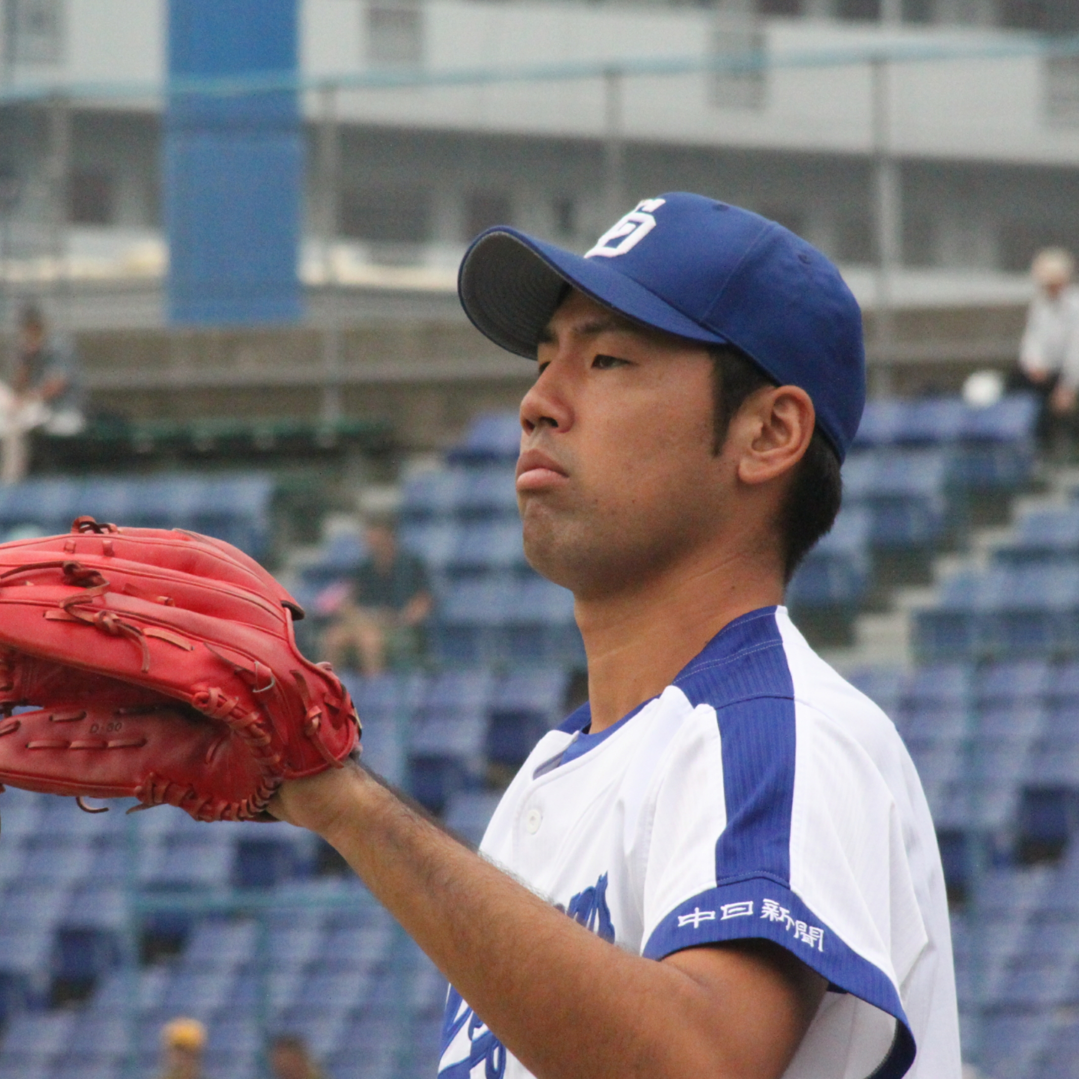 2017年9月20日、ナゴヤ球場にて